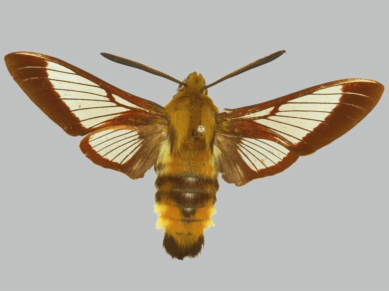 Самец Hemaris beresowskii